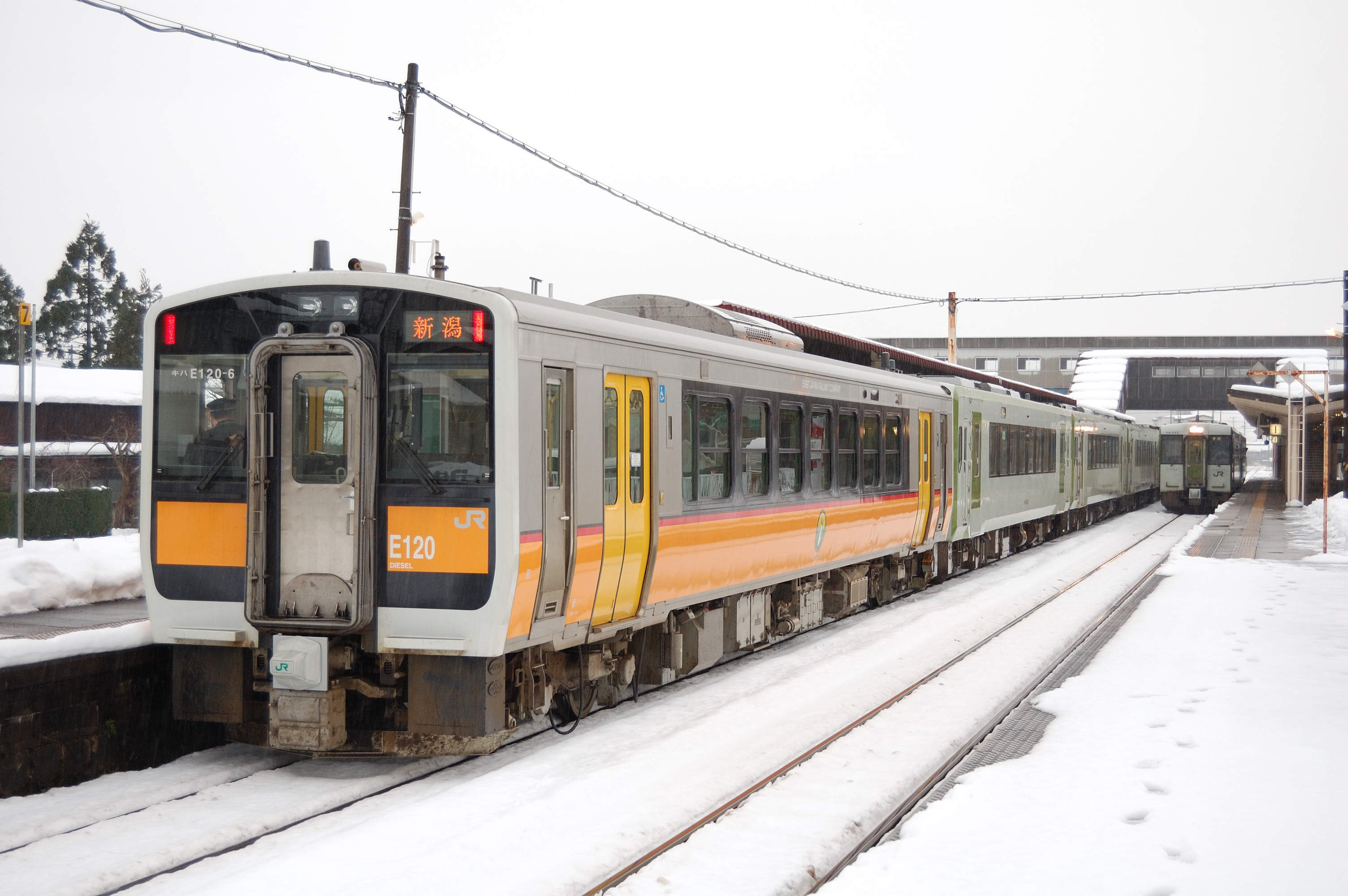 キハE120。磐越西線・五泉駅にて。